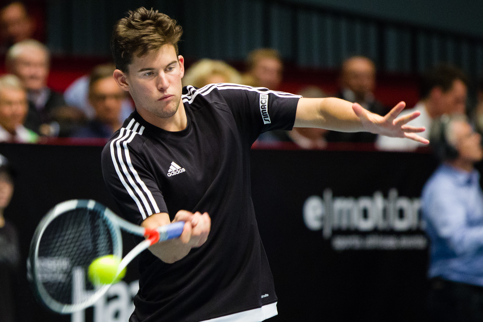 Tie Break Tens in Wien am 23.10.2016 (side event der Erste Bank Open ATP World Tour 500 2016)